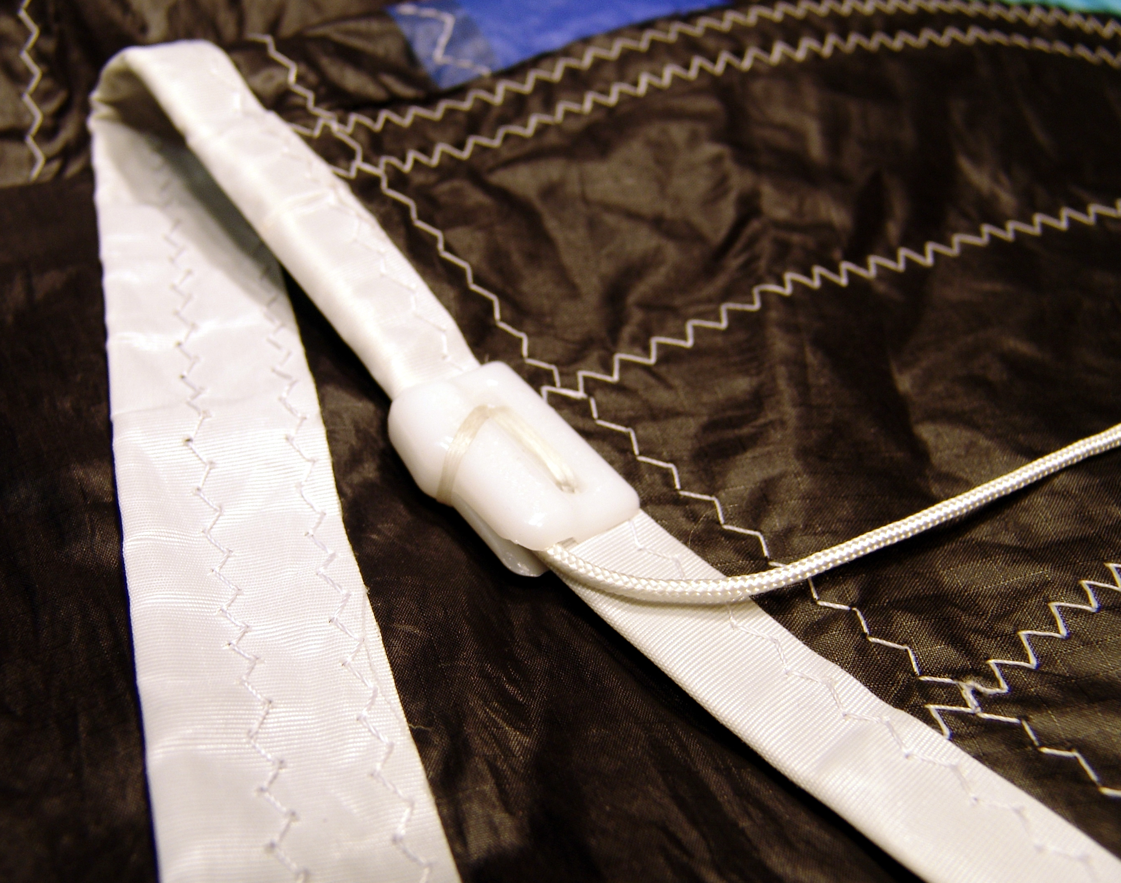 Liekleine an einem Gennaker